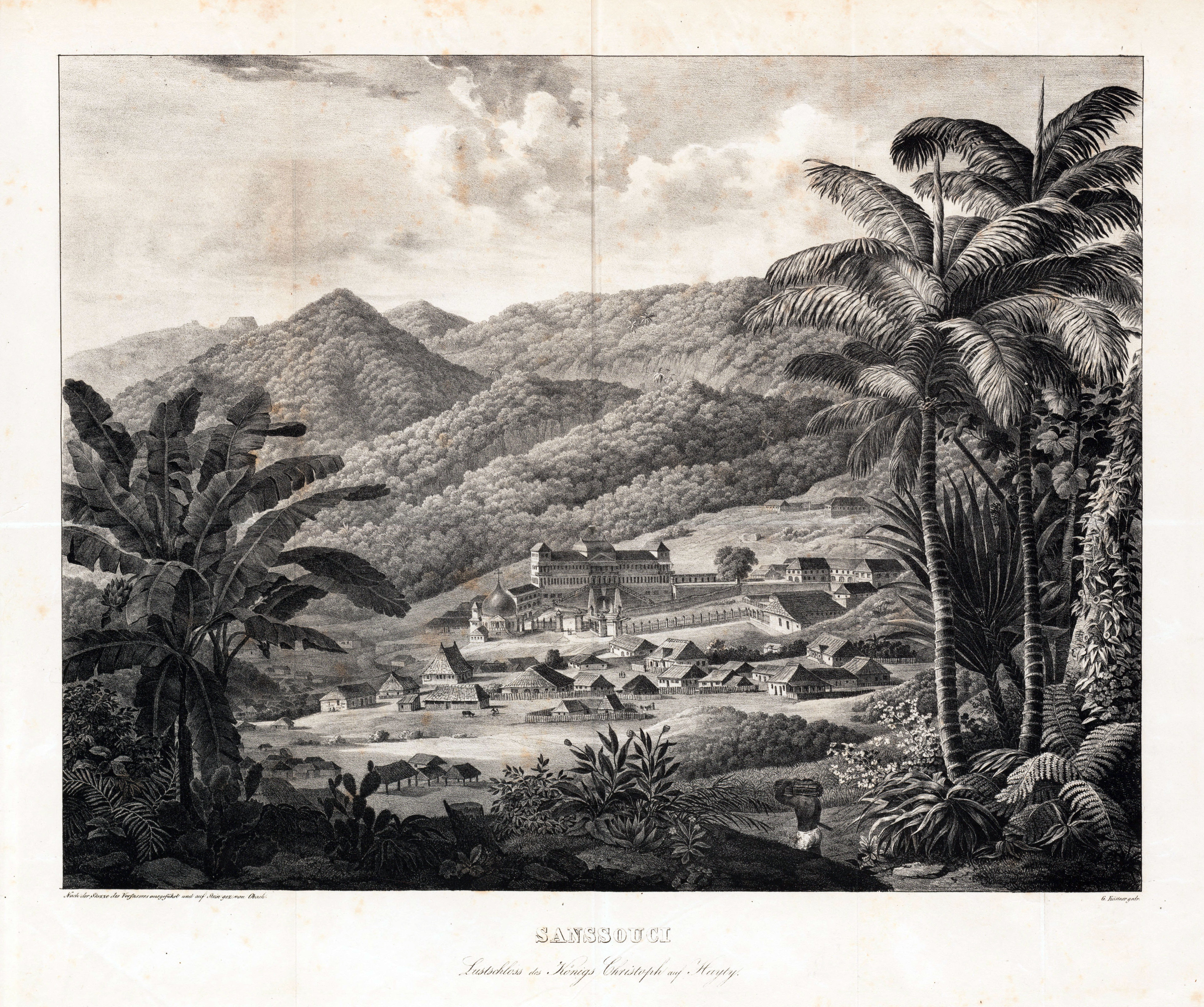 "Sanssouci, Lustschloss des Königs Christoph auf Hayti", Illustration, Lithographie.